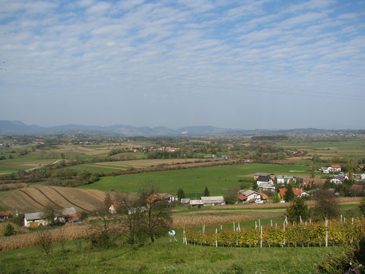 Pogled na Kraj Donji, općina Marija Gorica, Zagrebačka županija